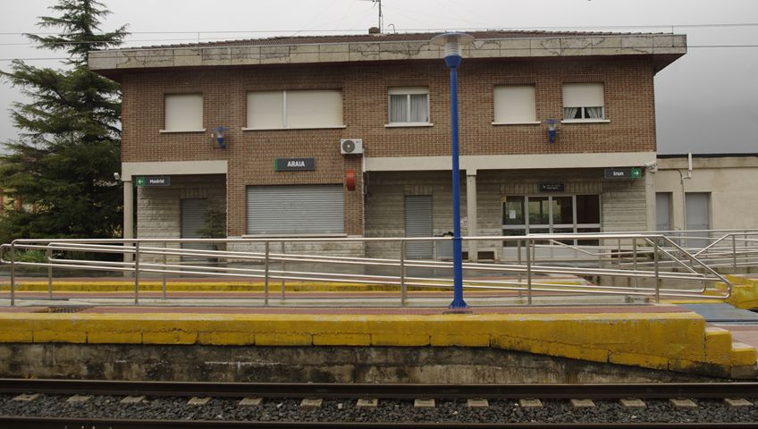 Estación de ferrocarril de Araia.